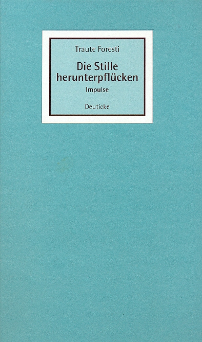 Book cover of Traute Foresti, "Die Stille herunterpflücken" 2002